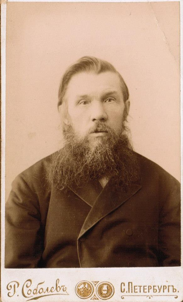 Каринский, Михаил Иванович (1840-1917), русский философ, логик